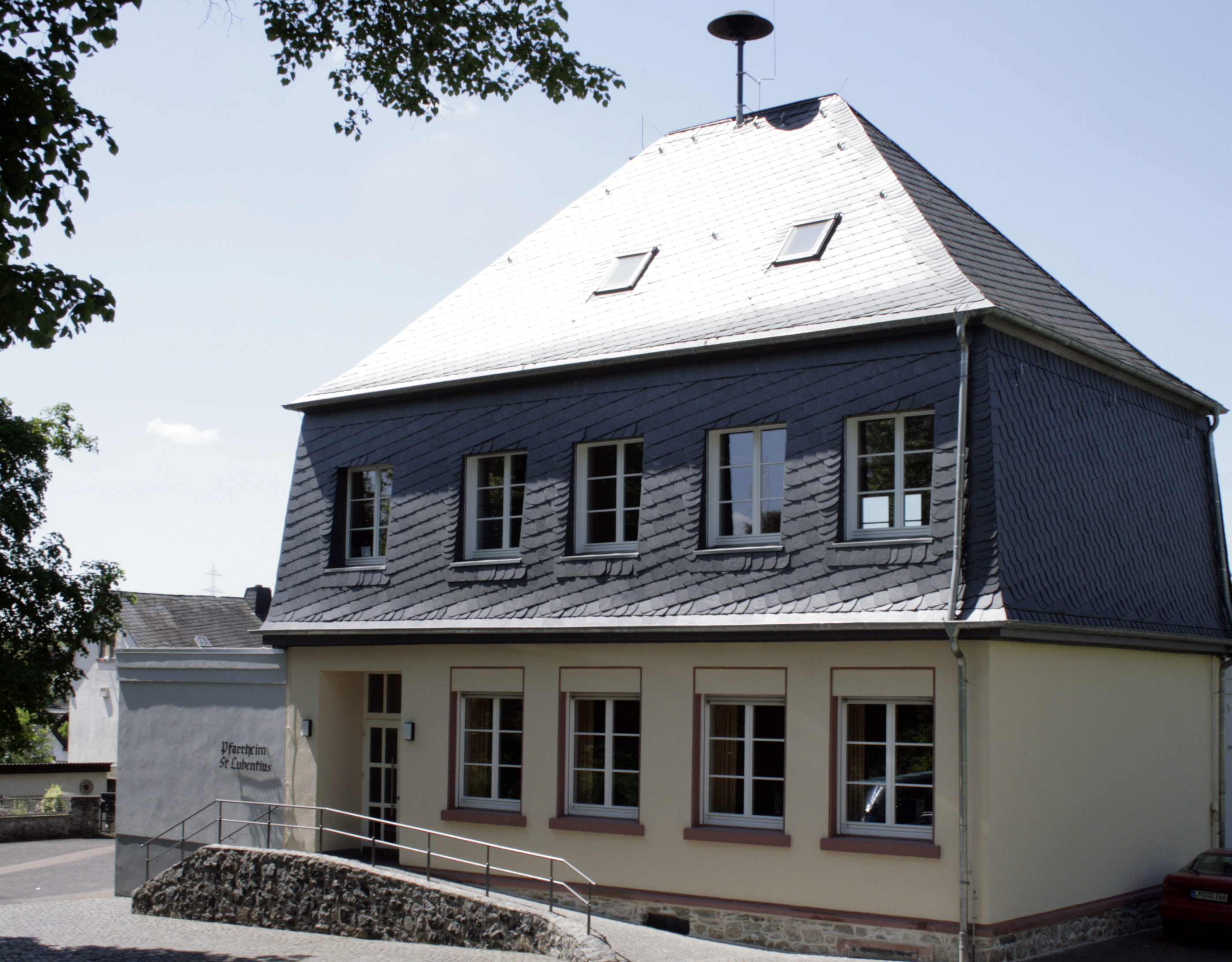 Pfarrheim von Dietkirchen, Deutschland